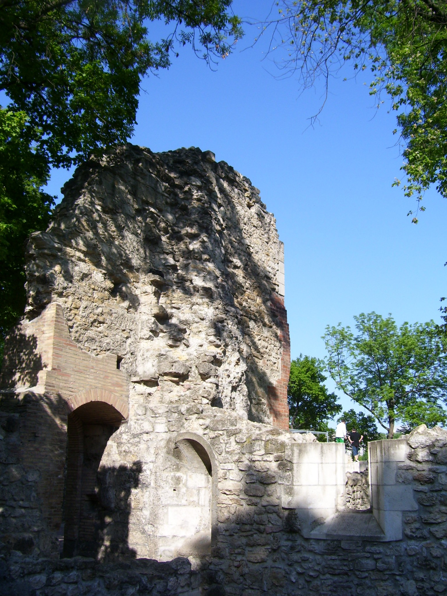 Szent Domonkos kolostor romjai. Budapest-Margitsziget